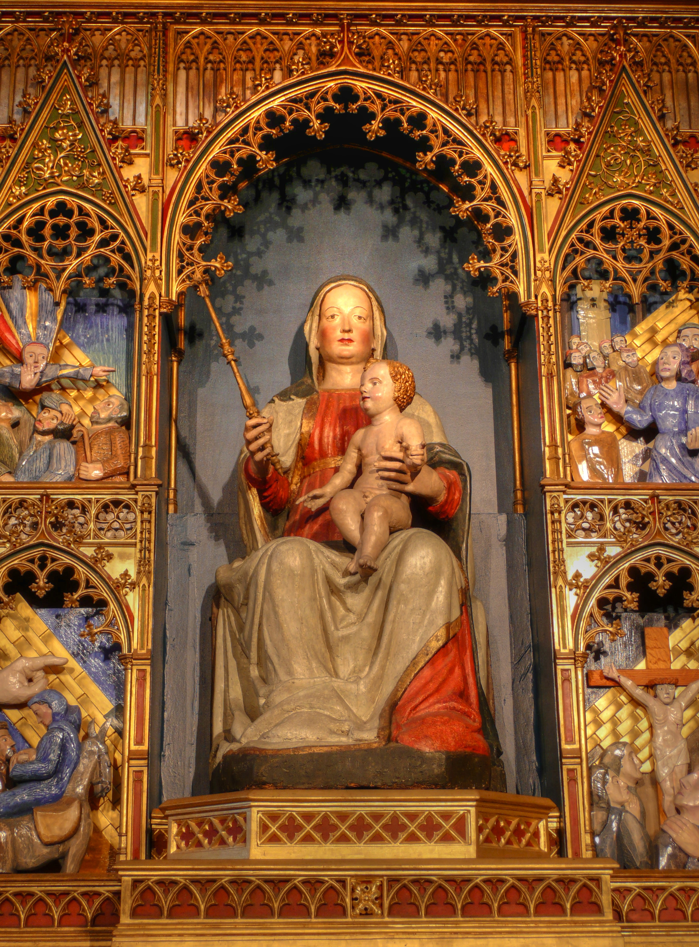 Madonna mit Kind aus dem Marienaltar der Kölner Kirche St. Aposteln (um 1500, Schwaben))